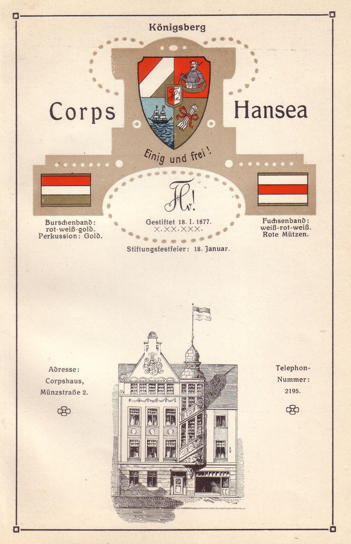 Wappen, Farben und erstes Corpshaus des Corps Hansea Königsberg